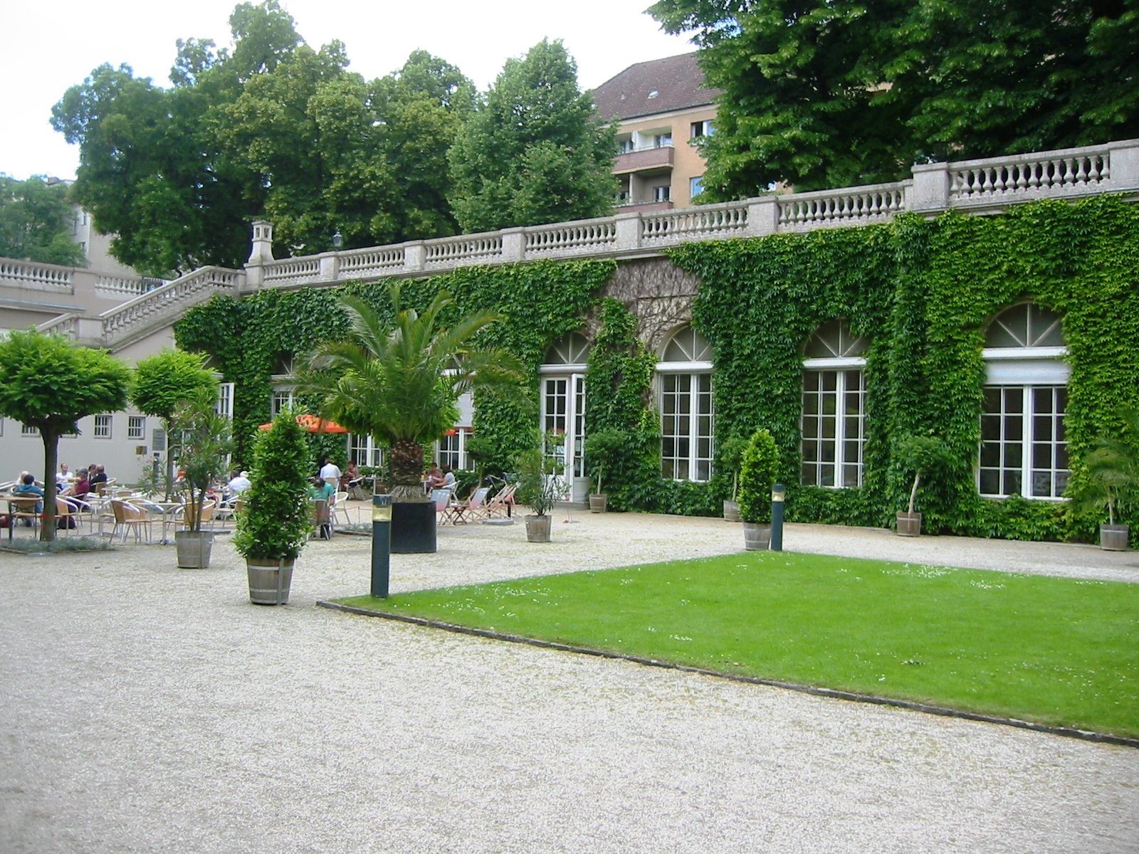 Orangerie im westlichen Teil des Körnerparks in Berlin-Neukölln